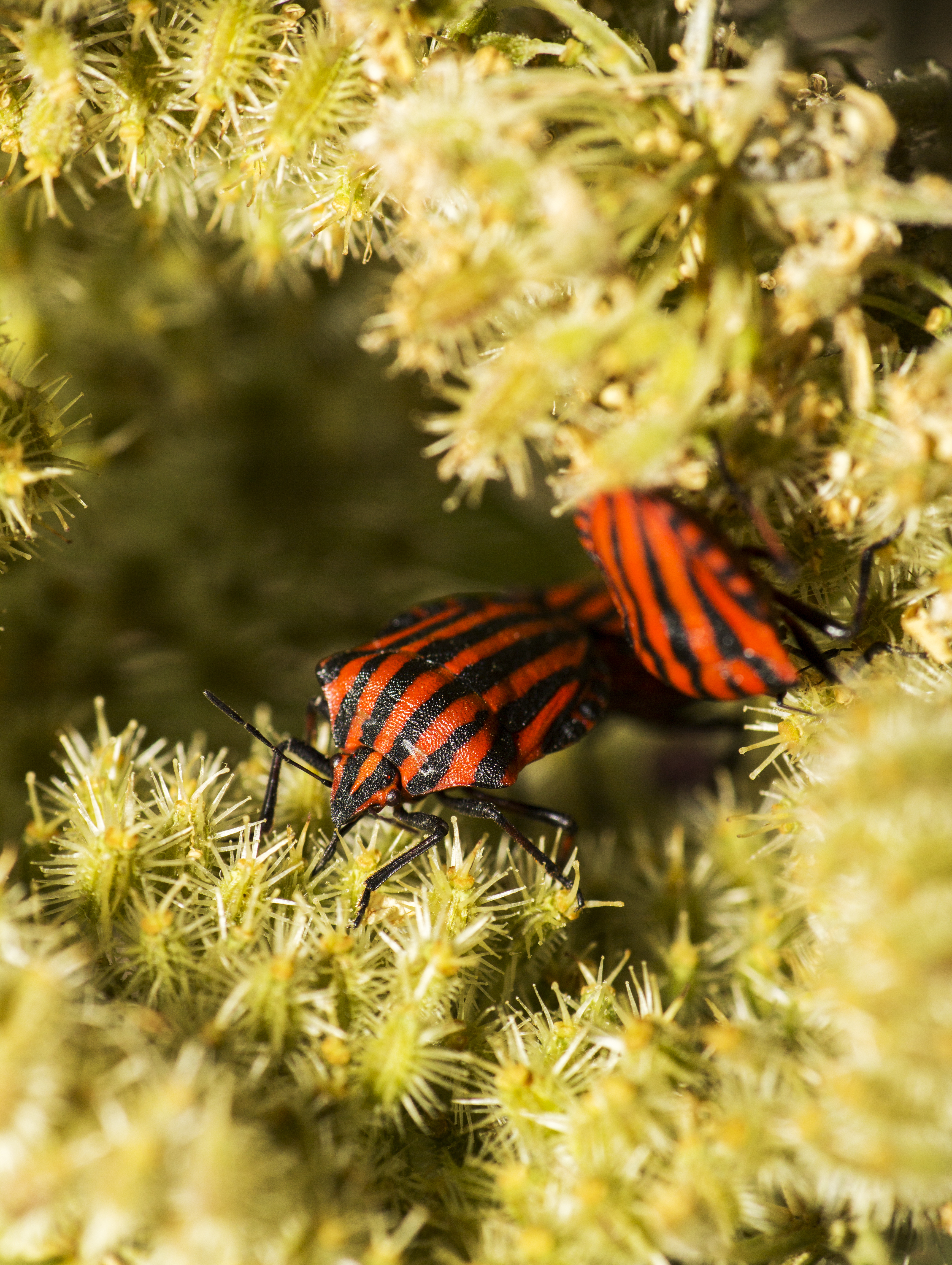 _MG_1955